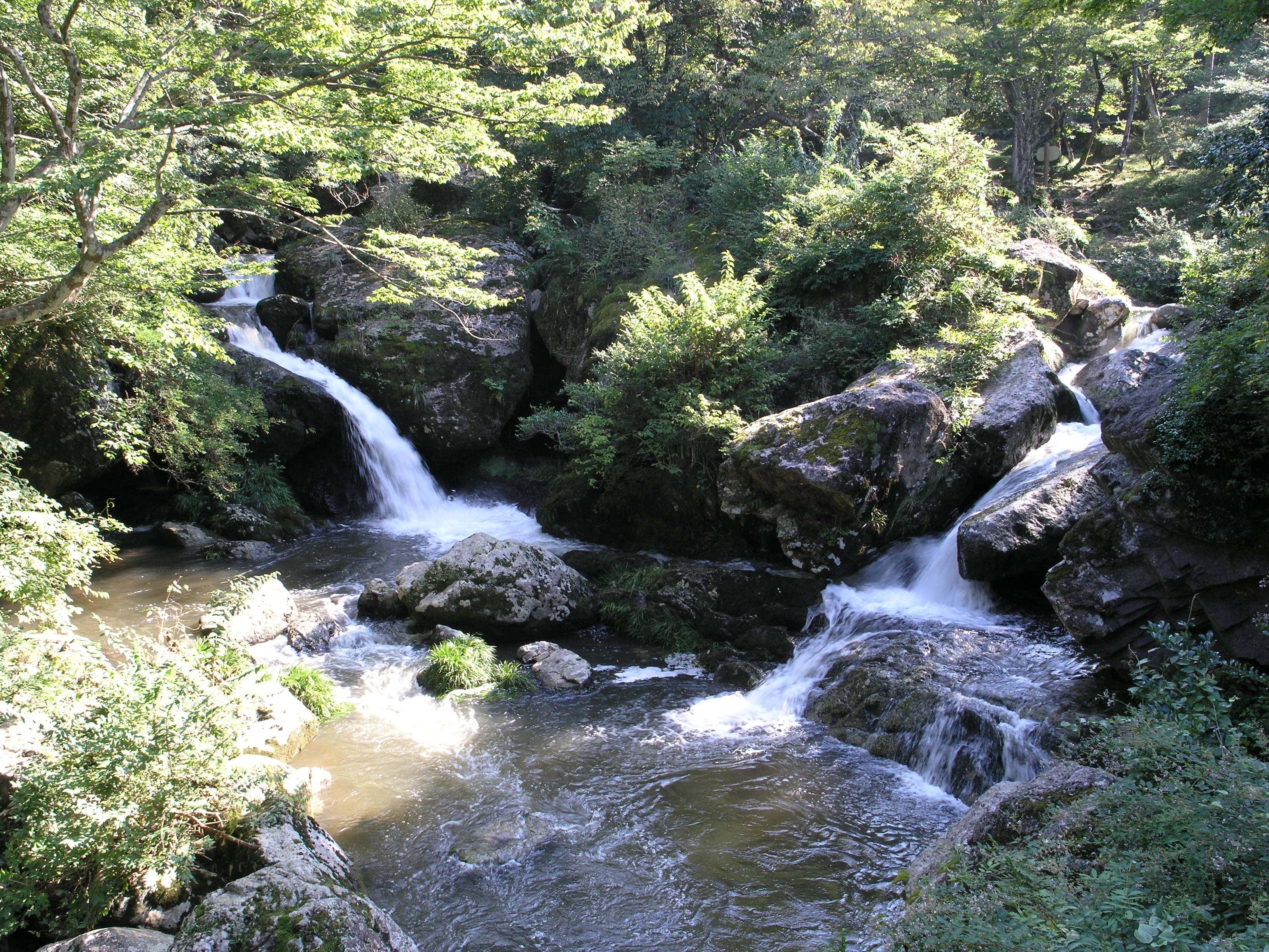 るり渓の名勝『鳴瀑』 (京都府南丹市) 2008年9月撮影。 機材：C8080WZ 撮影者：Kansai explorer